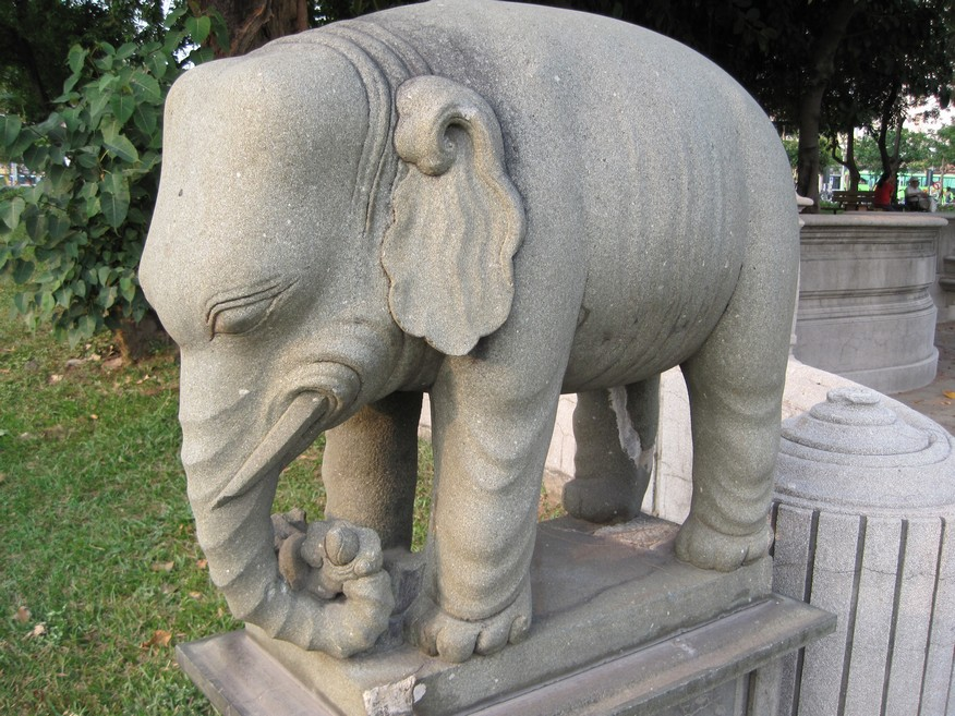 高雄陳中和墓石象。